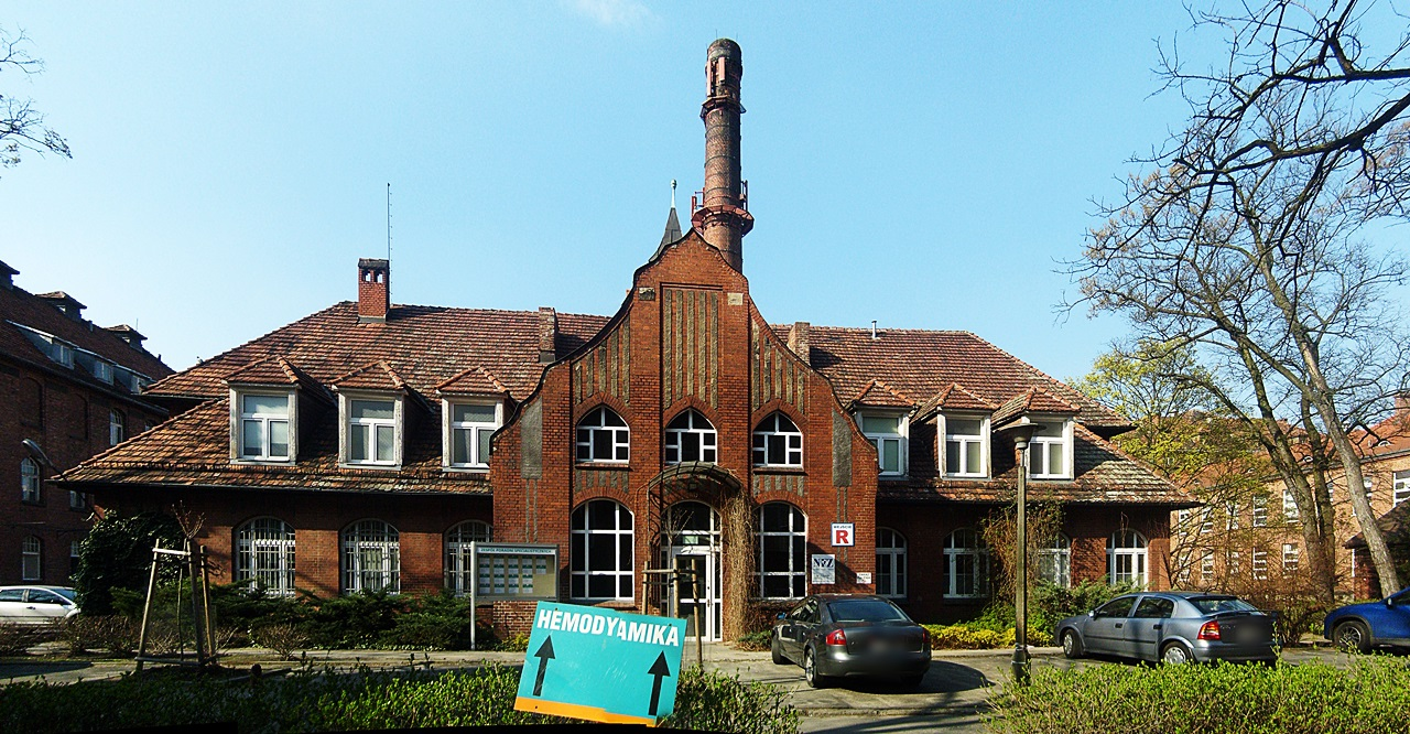 Poznań, Heliodor Święcicki Hospital; budynek poradni